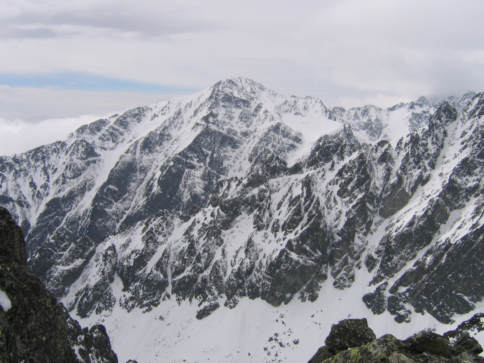 sk: Slavkovský štít - pohľad z Lomnického sedla, vpravo v popredí hrebeň Prostredného hrotu, Vysoké Tatry, Slovensko author: Juloml, april 2006